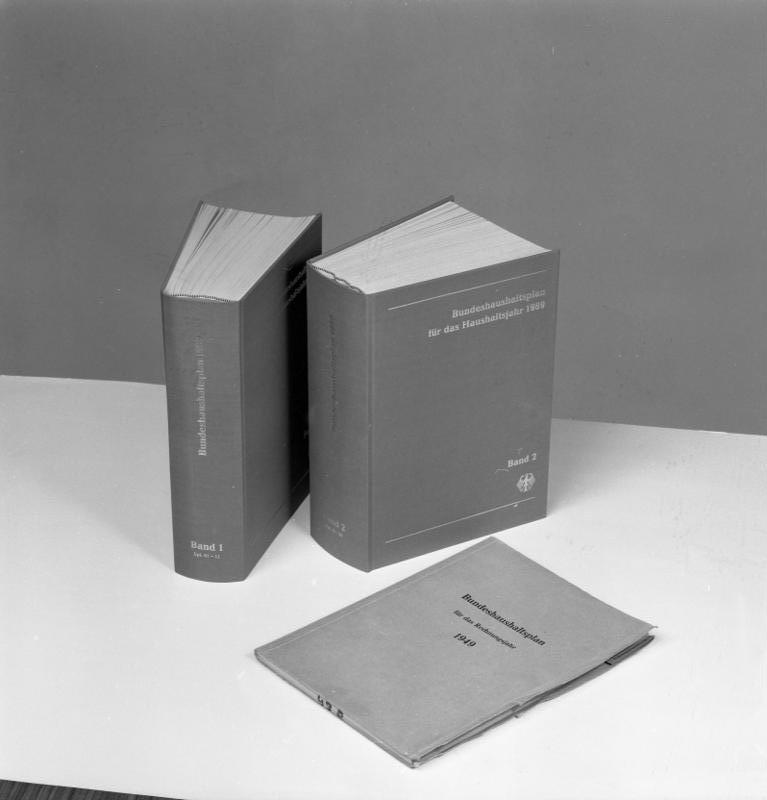 2.5.1989 Bundeshaushaltsplan für das Haushaltsplan 1989 (2 Bände) im Vergleich mit dem Bundeshaushaltsplan für das Rechnungsjahr 1949.